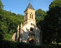 RABAS - 57640 Saint-Hubert France - vallée de la canner